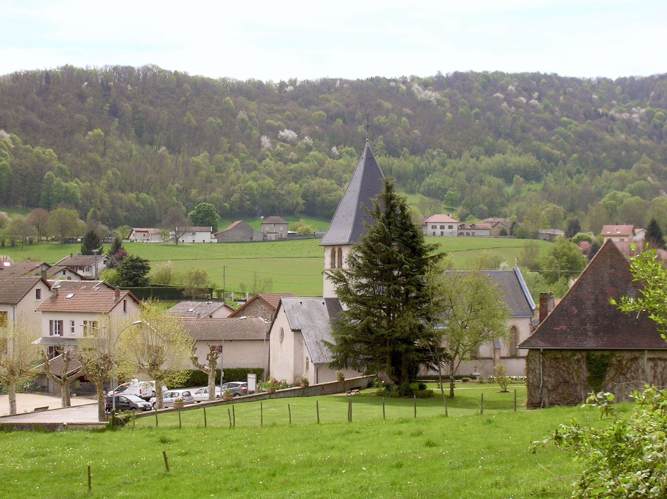 Église Saint-Pierre-et-Saint-Paul de Brié, Brié-et-Angonnes, Isère, Rhone-Alpes, France.